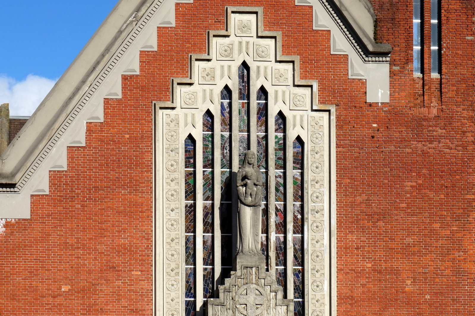 Eglise